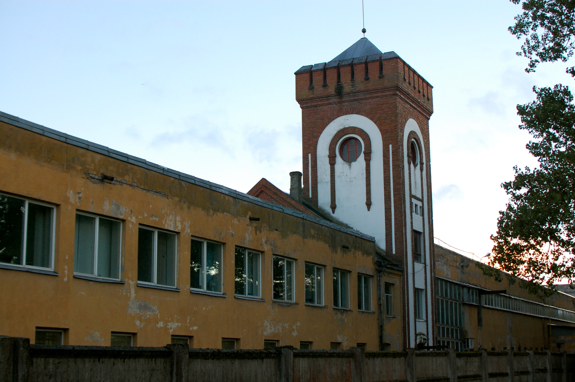 Viljandi tuletikuvabriku torn, 1904.a.